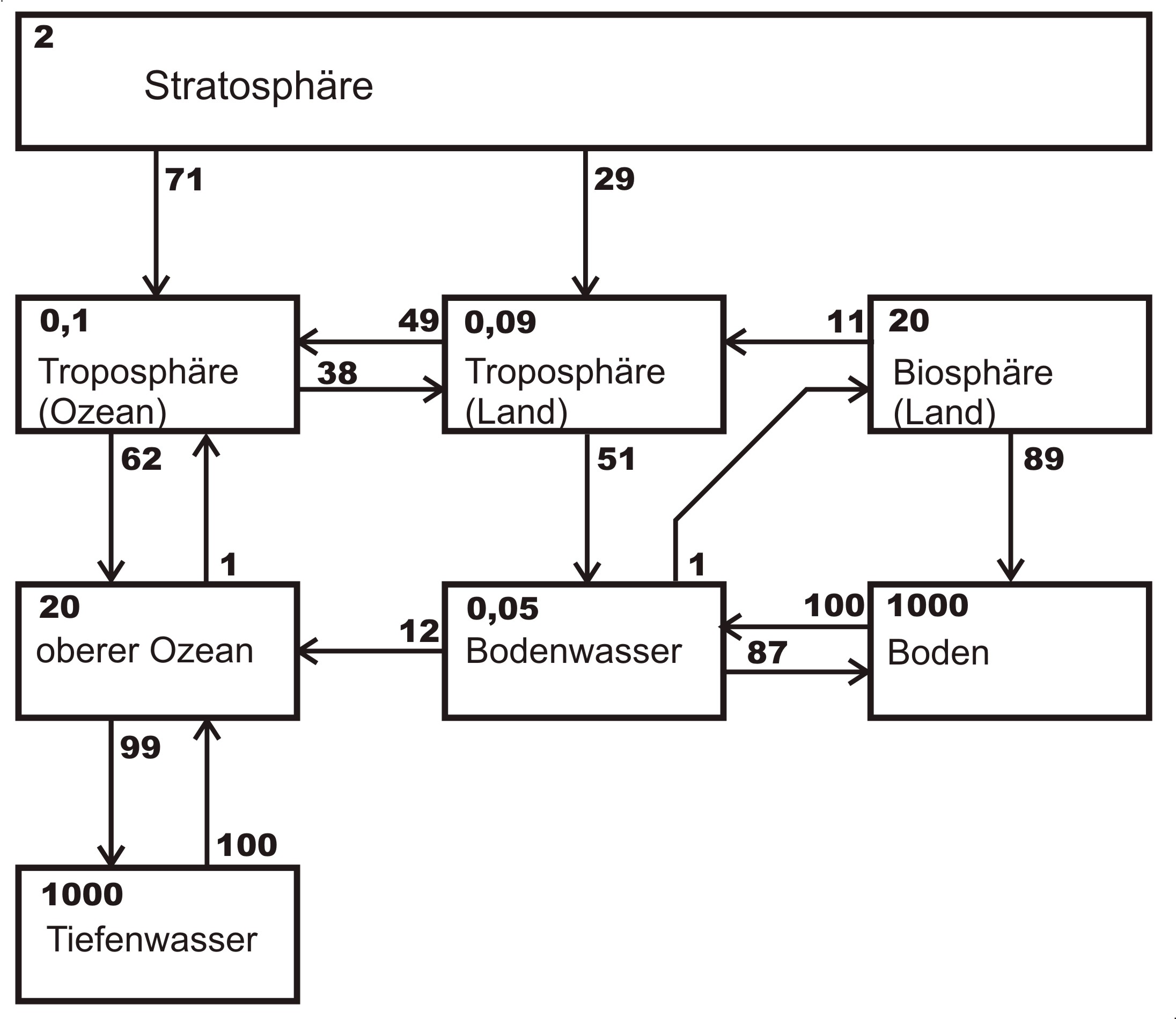 Globaler Iodkreislauf. Die Zahl links oben in jeder Box zeigt die mittlere Aufenthaltszeit [a], die Zahlen an den Pfeilen die Verteilung des die Box verlassenden Iods in %.